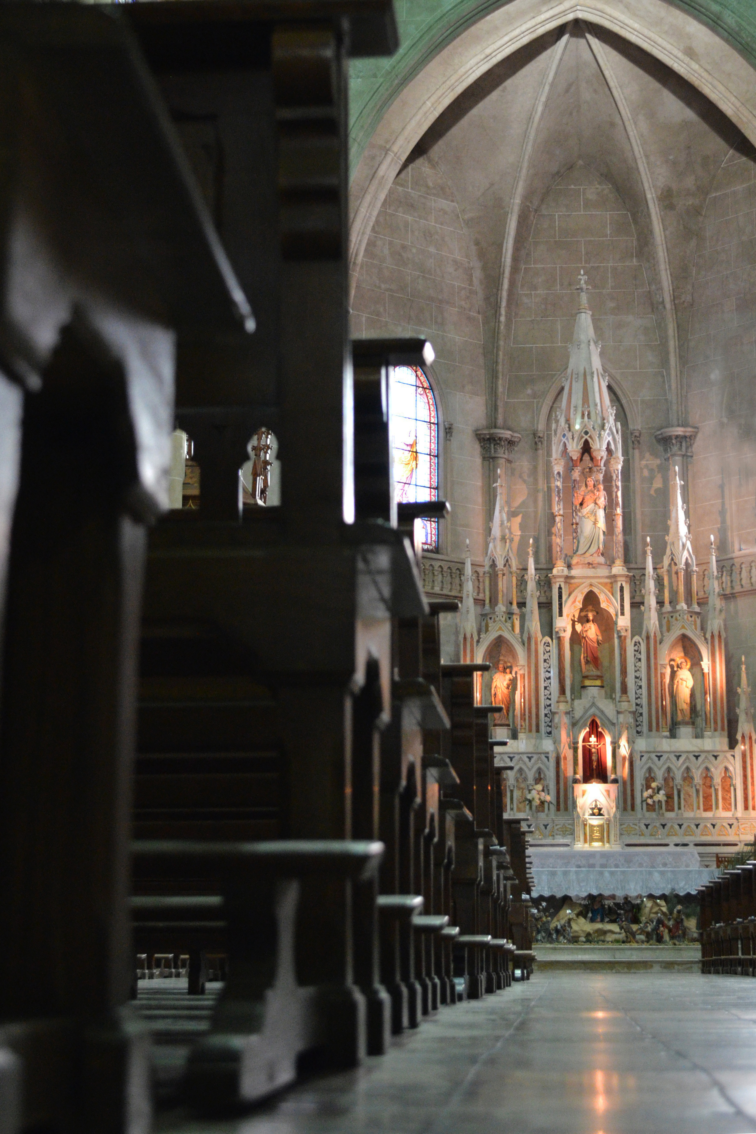 Catedral Nuestra Señora del Rosario de Azul